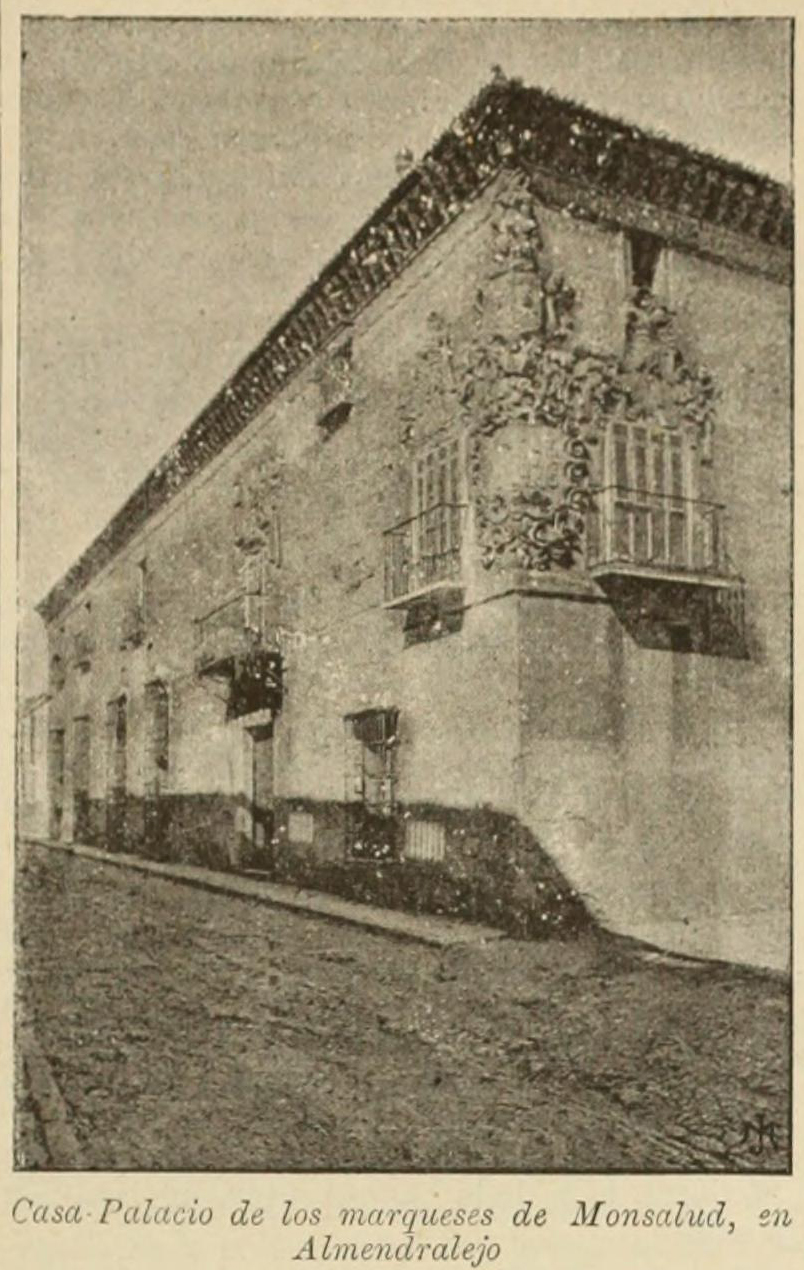 Casa-palacio de los marqueses de Monsalud, en Almendralejo.